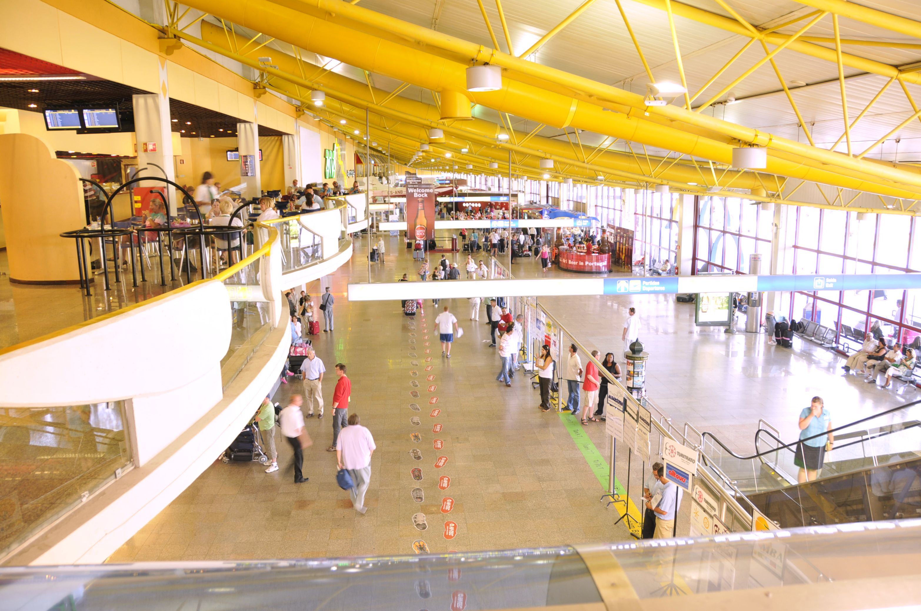 Abfertigungshalle des Flughafens von Faro